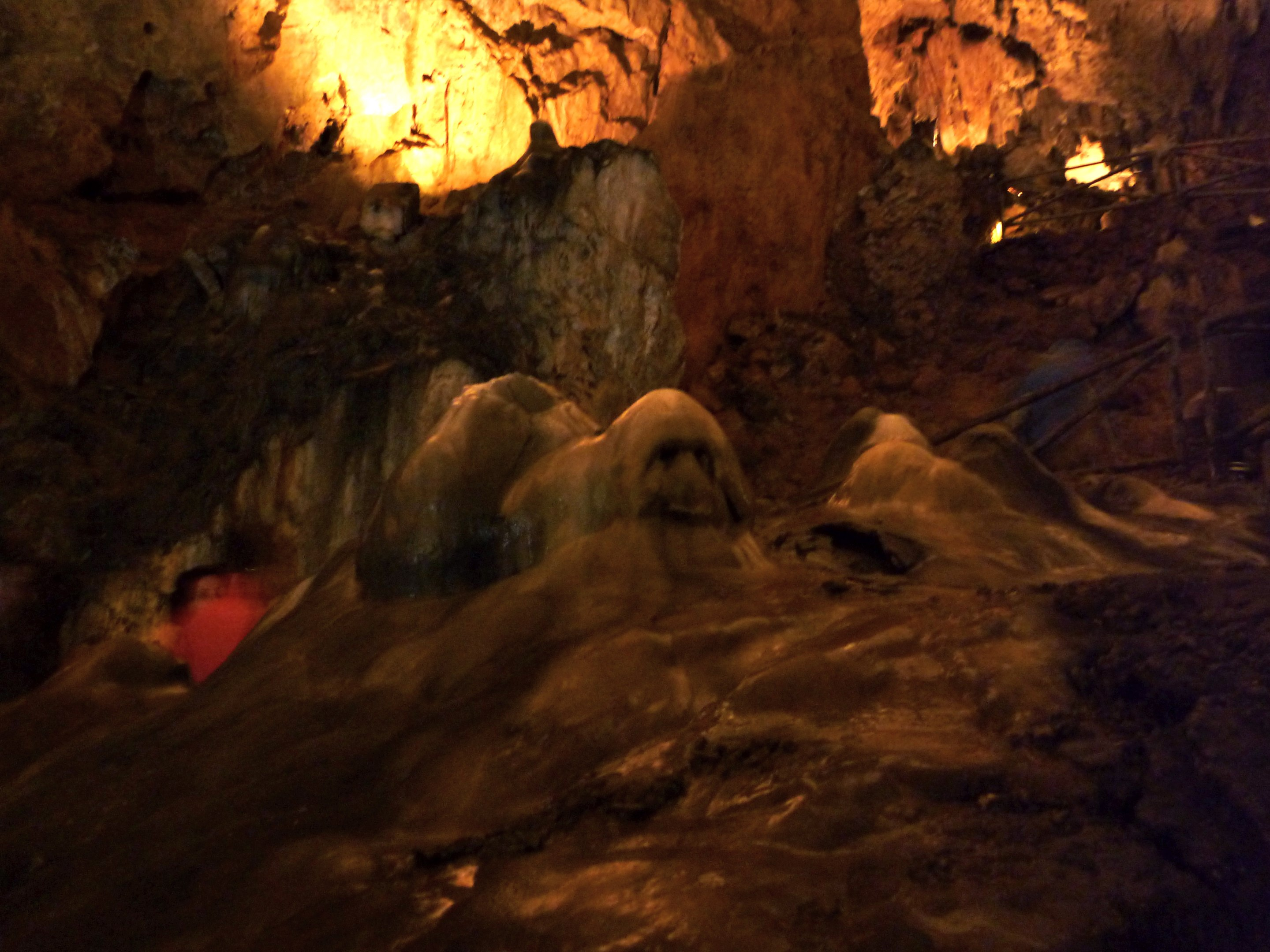 Aunque para mí es un perro, pero bueno. ;)